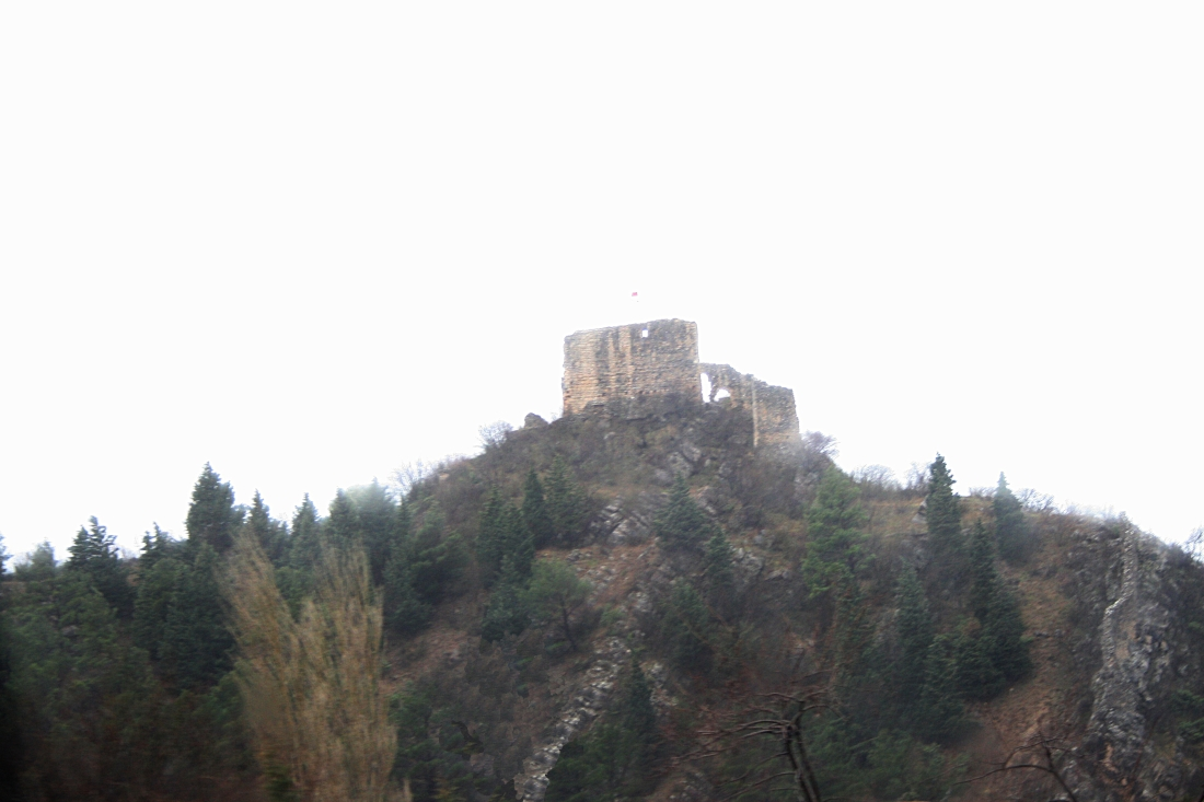 Zagreb_Split